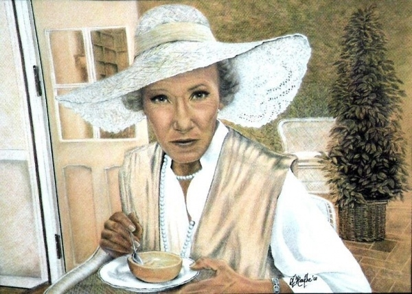 Brigitte Horney 1911 - 1988